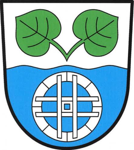 Trotina znak